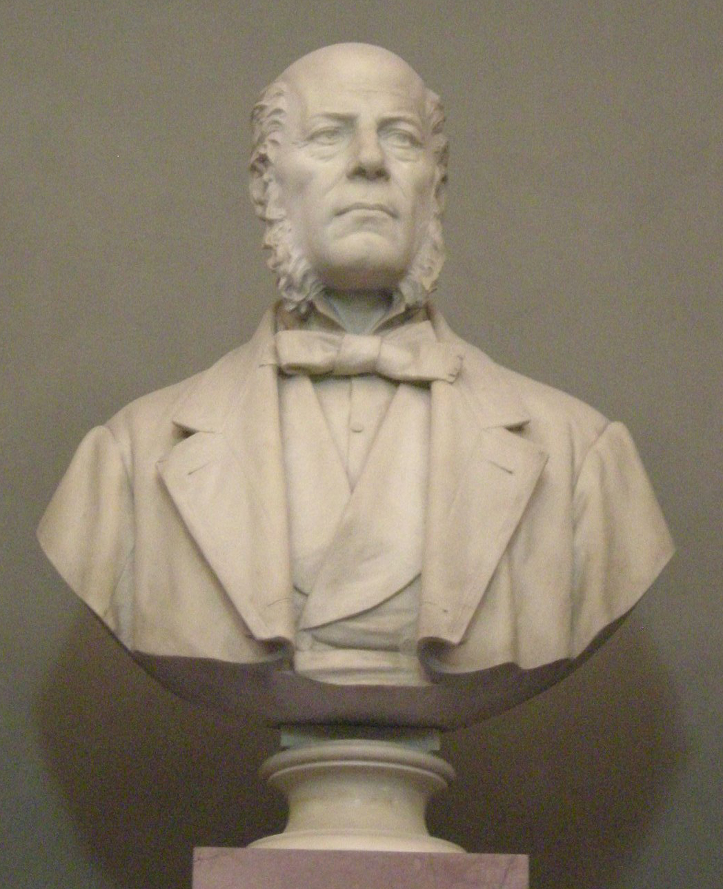 Palazzo della banca d'italia, fi, piano terra, sala 1, busto bombrini 2